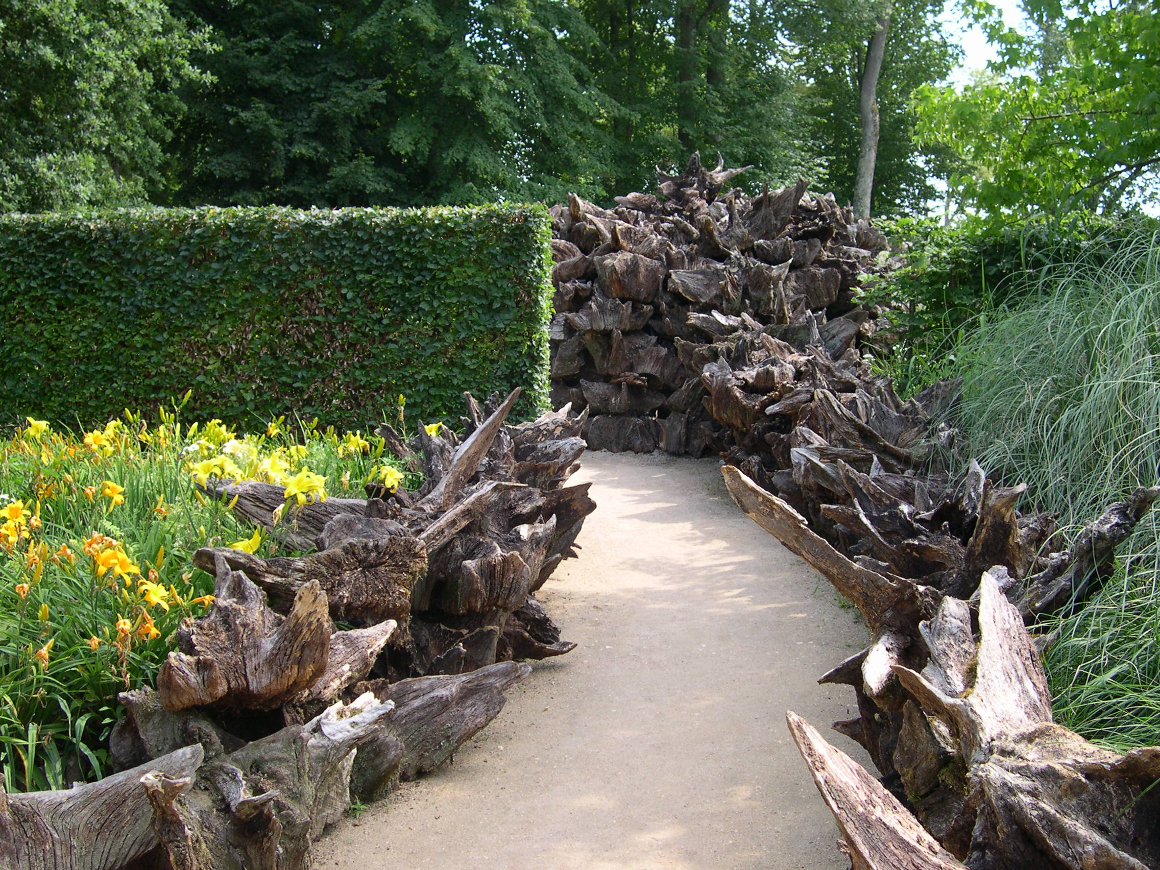 France Loir-et-Cher Festival jardins Chaumont-sur-Loire 2005 13 Stumpery Photographie prise par GIRAUD Patrick